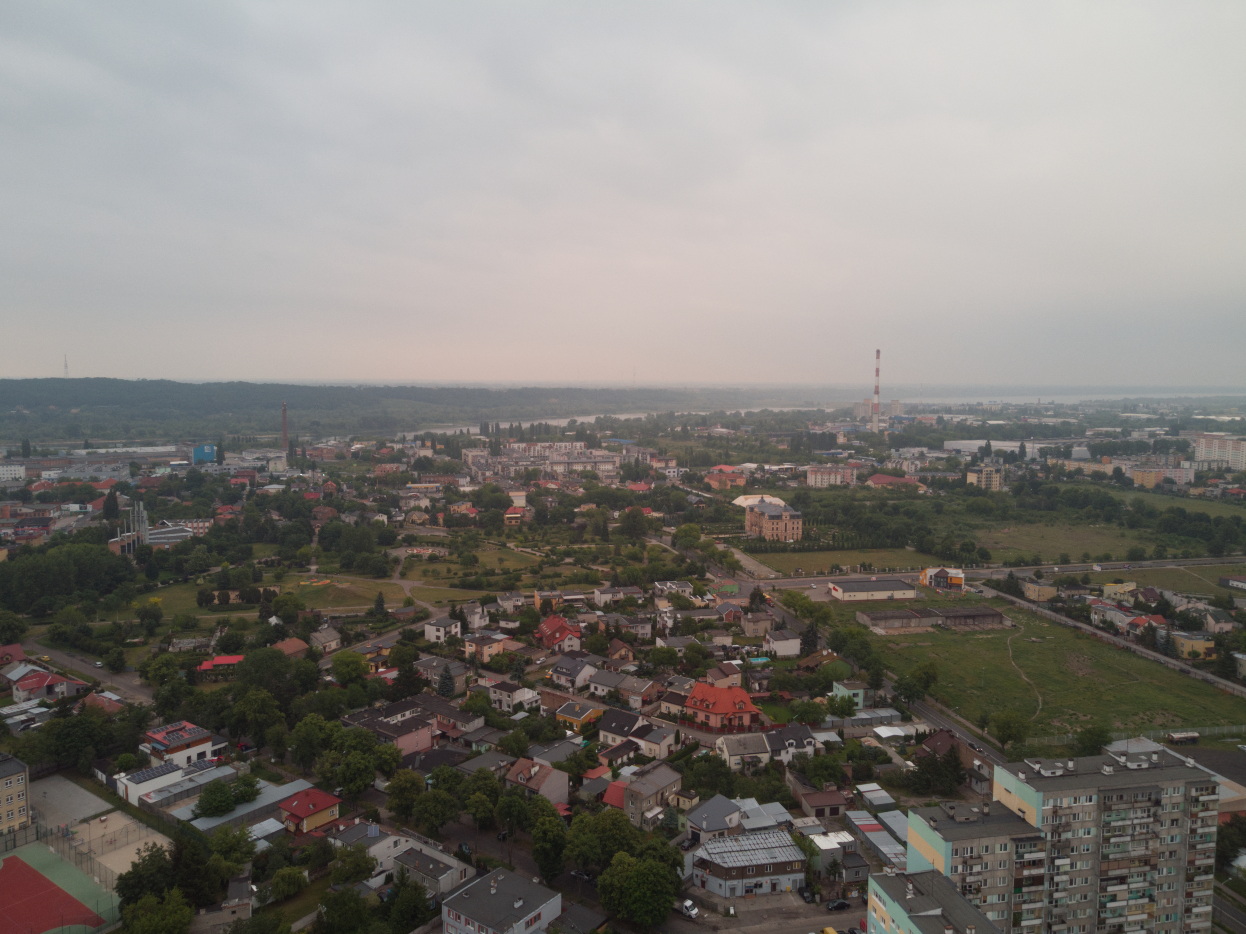 Styk Kazimierza Wielkiego i Śródmieścia (2020 r.)